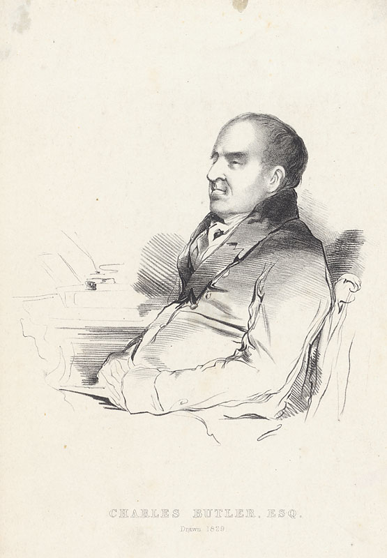 Charles Butler (1750-1832)